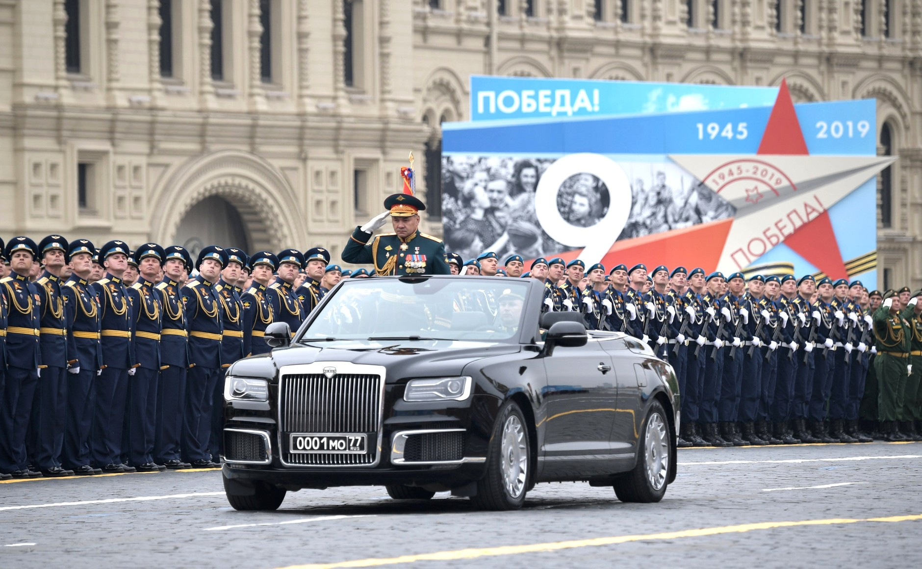 Военный парад на Красной площади в ознаменование 74-й годовщины Победы в Великой Отечественной войне 1941–1945 годов